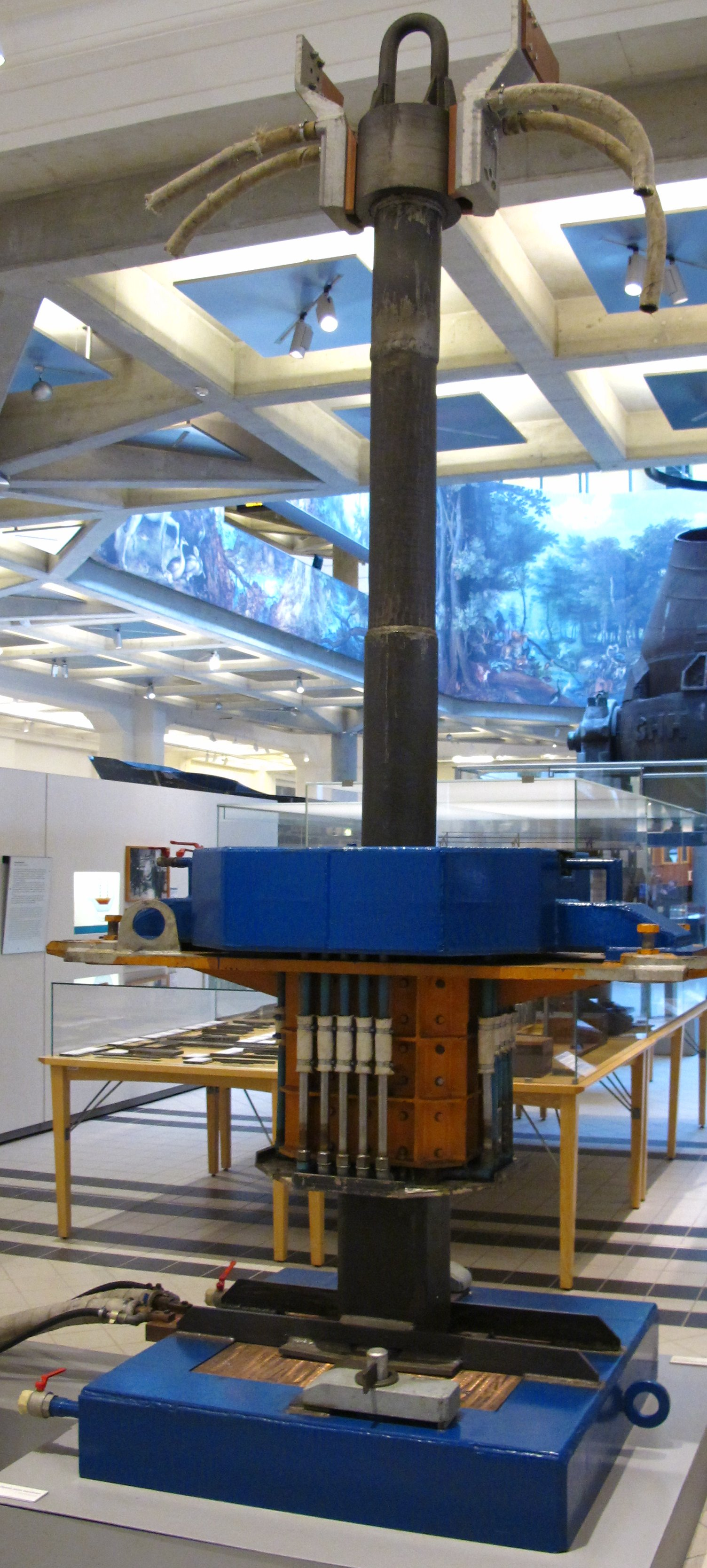 Kokille einer Elektroschlacke-Umschmelzanlage (ESU). Das Elektroschlacke-Umschmelzverfahren dient zur Erzeugung hochreiner Stähle: Ein fester Stahlblock wird in ein Schleckenbad eingetaucht. Der Block fungiert als Strom führende Elektrode und schmilzt ab. Beim Durchgang durch die Schlacke wird der Stahl gereinigt und starrt unter der Schlacke. Diese ESU-Anlage ging 1977 im Wer Judenburg der Vereinigten Edelstahlwerke in Betrieb. Sie besteht aus einer Kupferbodenplatte, der vertikal beweglichen Kokille, einem Rundstahlblock als Elektrode und aus dem dem neuen ESU-Block. Produziert wurden in dieser Anlage Werkzeug- und Schellarbeitsstähle, hochfeste und hachwarmfeste Stähle sowie Sonderlegierungen wie ferritische und austenitische Stähle. Hersteller: Böhler Edelstahl Baujahr: 1977